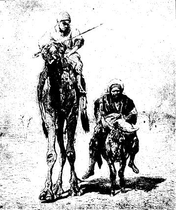 Arabic fellahs